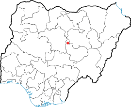 Localização de Jos na Nigéria.